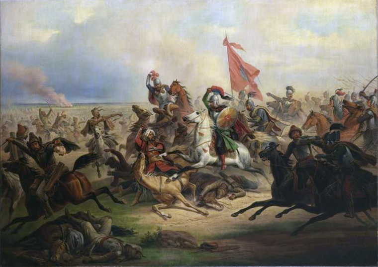 Беларуская (тарашкевіца): Рамана Сангушкі (Raman Sanguška) ў бітве з татарамі